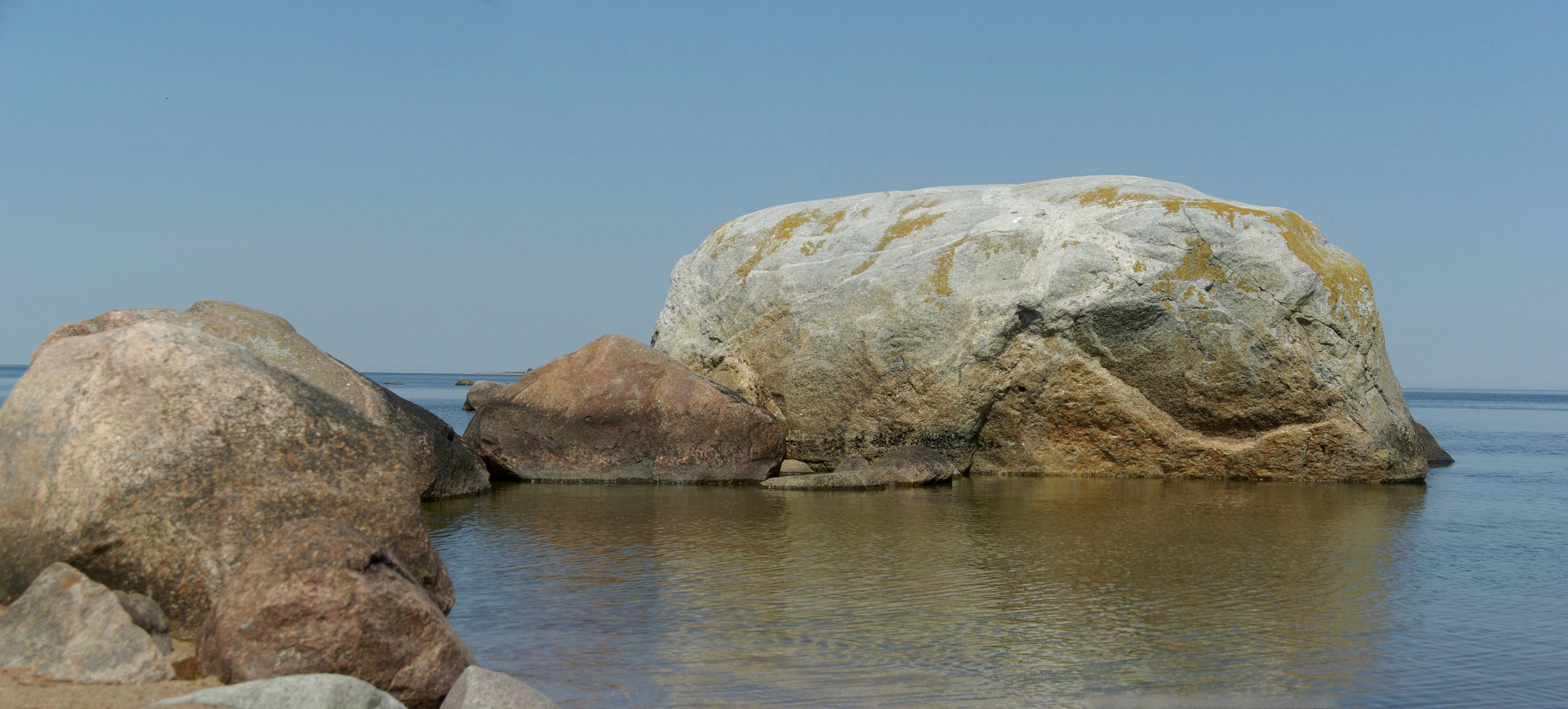 Koipsi (ka Koipse) saar asub Harju maakonnas Jõelähtme vallas Kaberneeme poolsaare otsast 1 km põhja pool